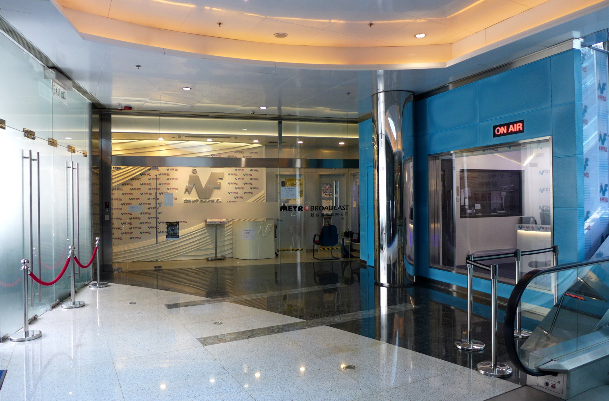 Metro Boardcast Central Studio